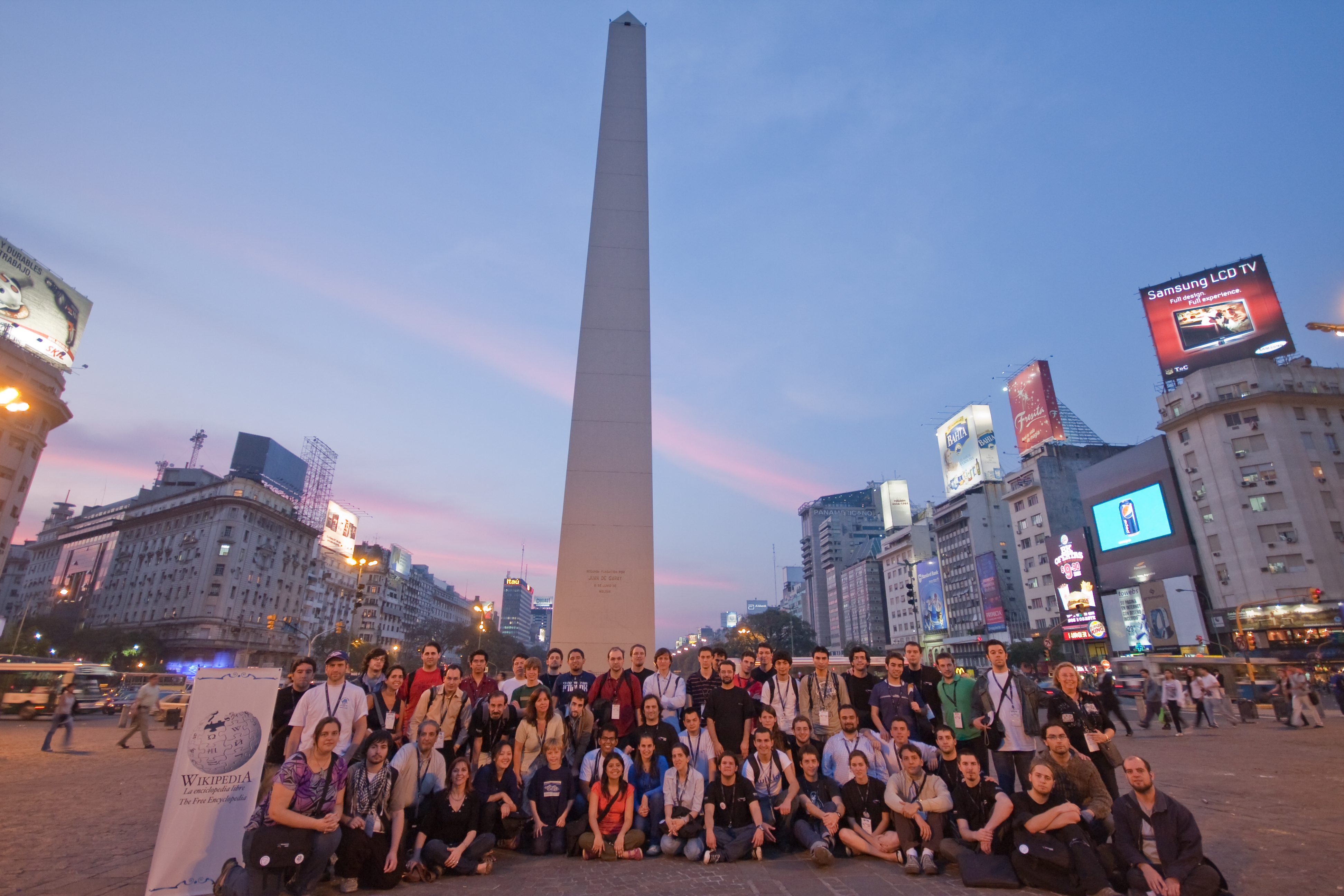 Foto grupal de Wikipedistas hispanohablantes (y otros amigos de ocasión) en el Obelisco, durante Wikimanía 2009.